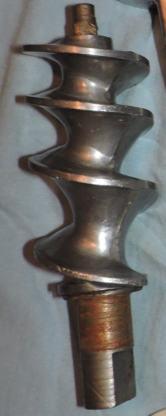 Schnecke eines Haushaltswolfs